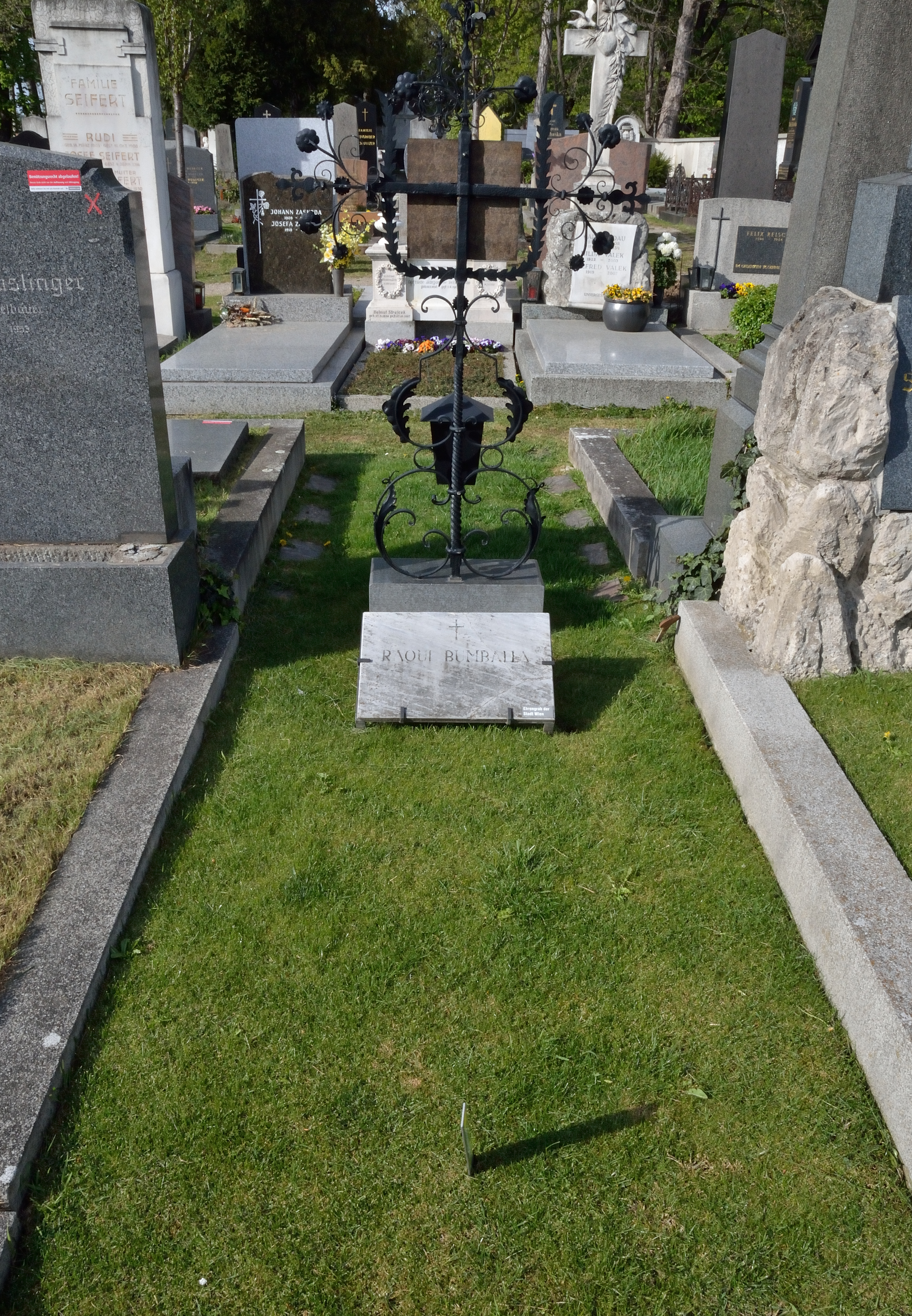 Ehrengrab für Raoul Bumballa (1895-1947) am Hietzinger Friedhof, Gruppe 16, Nr. 53